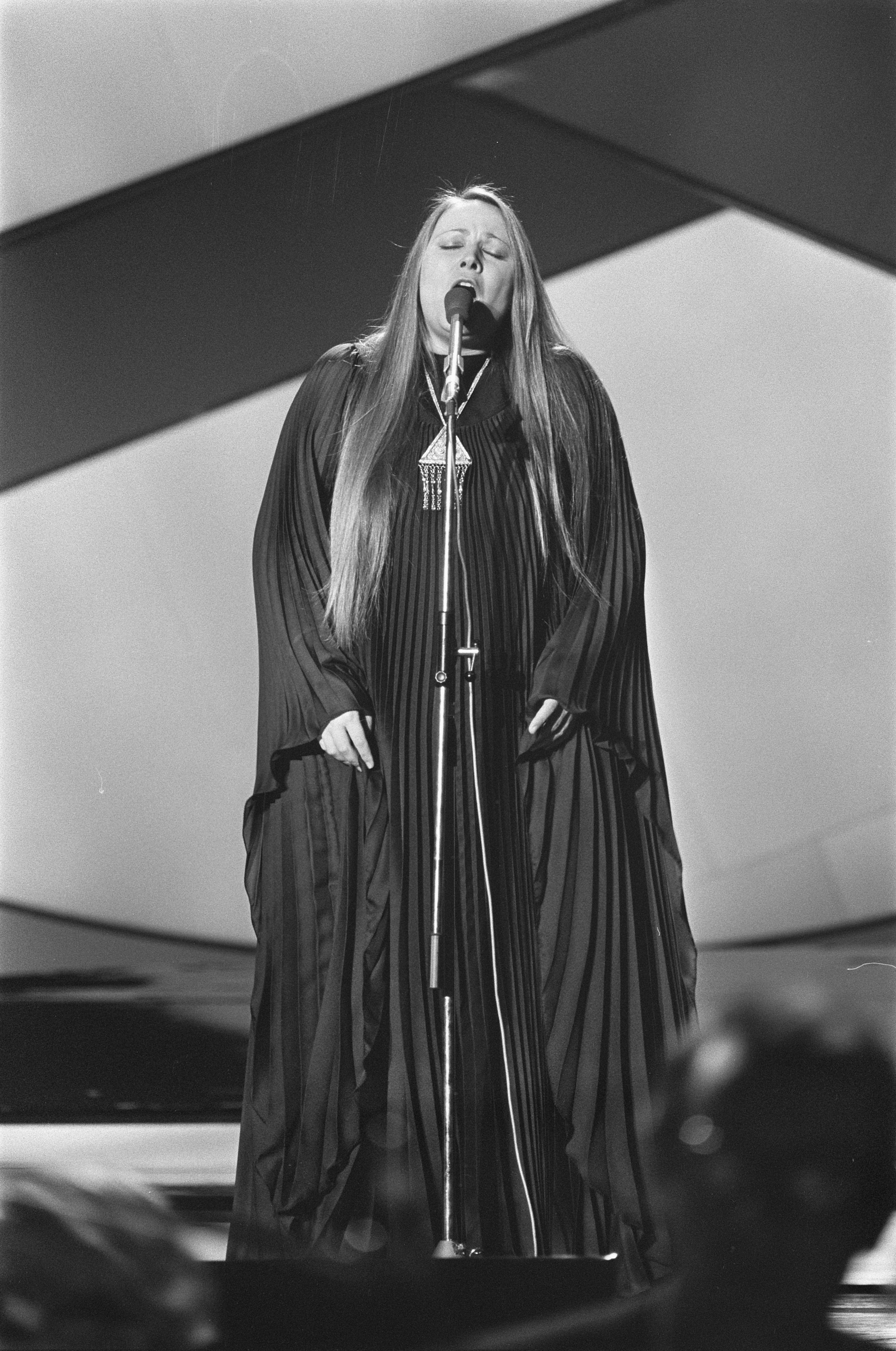 Collectie / Archief : Fotocollectie Anefo Reportage / Serie : [ onbekend ] Beschrijving : Eurovisie Songfestival 76 Den Haag ; Mariza Koch (Griekenland) Datum : 3 april 1976 Locatie : Den Haag, Griekenland Trefwoorden : songfestivals Persoonsnaam : Eurovisie Songfestival Fotograaf : Mieremet, Rob / Anefo Auteursrechthebbende : Nationaal Archief Materiaalsoort : Negatief (zwart/wit) Nummer archiefinventaris : bekijk toegang 2.24.01.05 Bestanddeelnummer : 928-5025